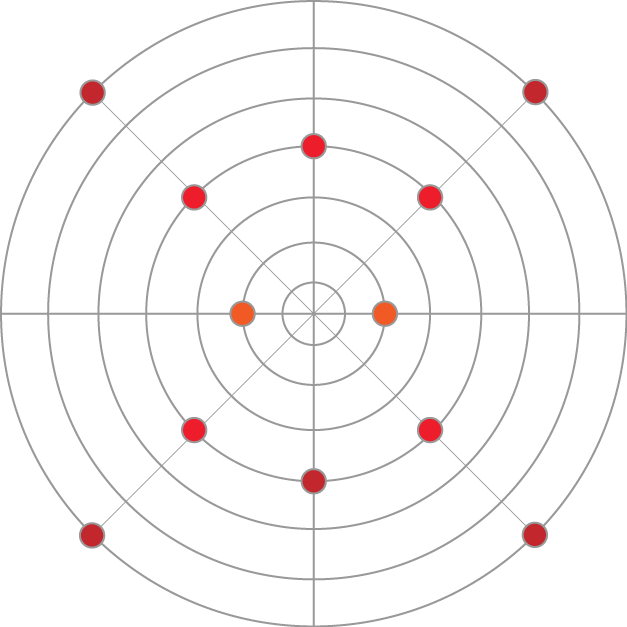 Aufbau AROS 2D